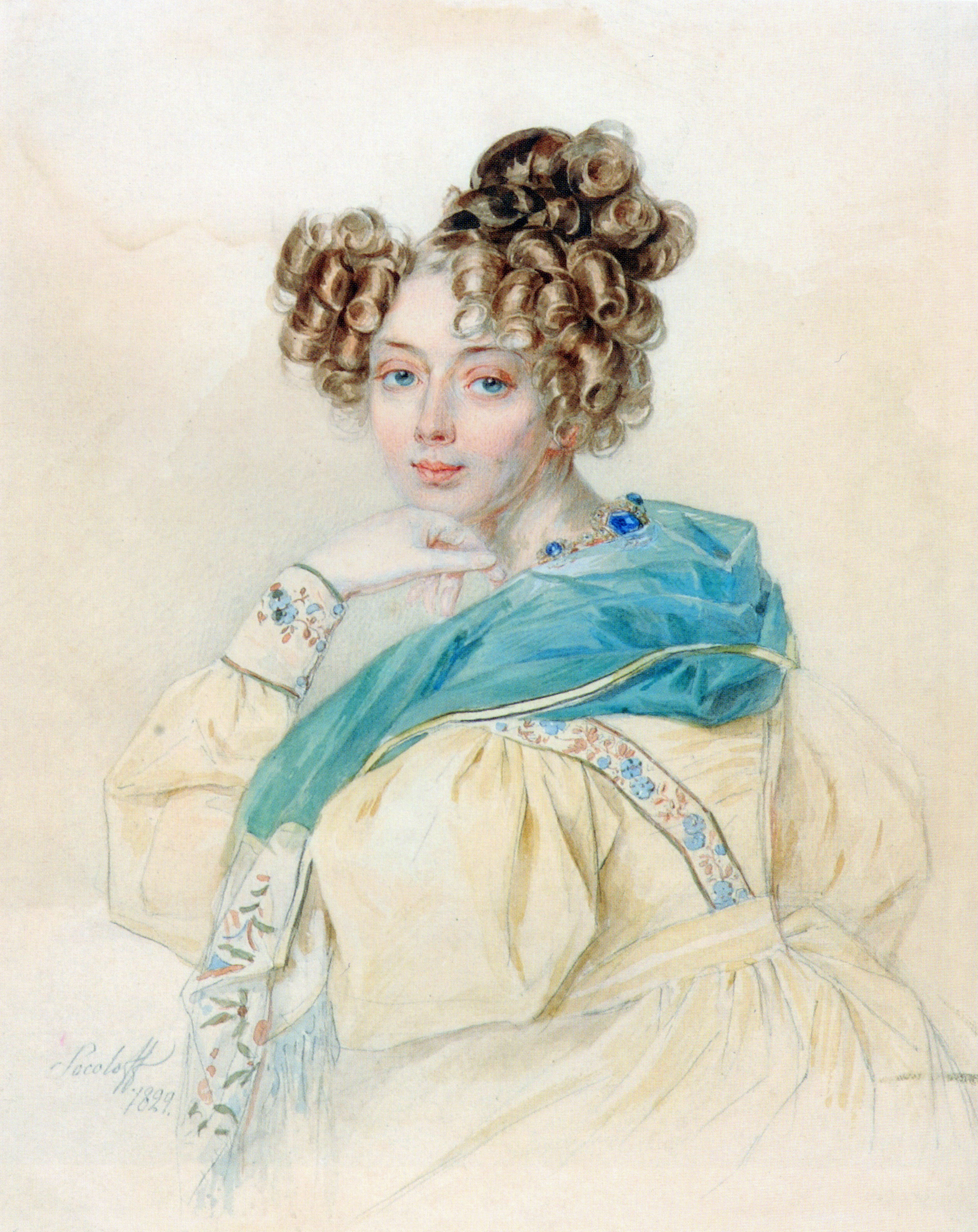 П.Ф.Соколов. Портрет графини О.А.Орловой. 1829. Бумага, акварель, карандаш, перо. Коллекция галереи «Попов и Ко» Графиня Ольга Александровна Орлова (1807–1880), урожденная Жеребцова. В 1826 году вышла замуж за графа А.Ф.Орлова, с 1857 года князя.В 1847 году была пожалована в статс-дамы